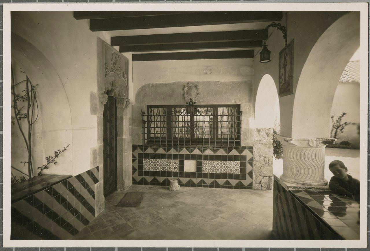 Interior del porxo d'entrada del xalet Senya Blanca de la Urbanització de S'Agaró. Es pot apreciar la riquesa en la decoració. El xalet es obra del l'arquitecte Rafael Masó.